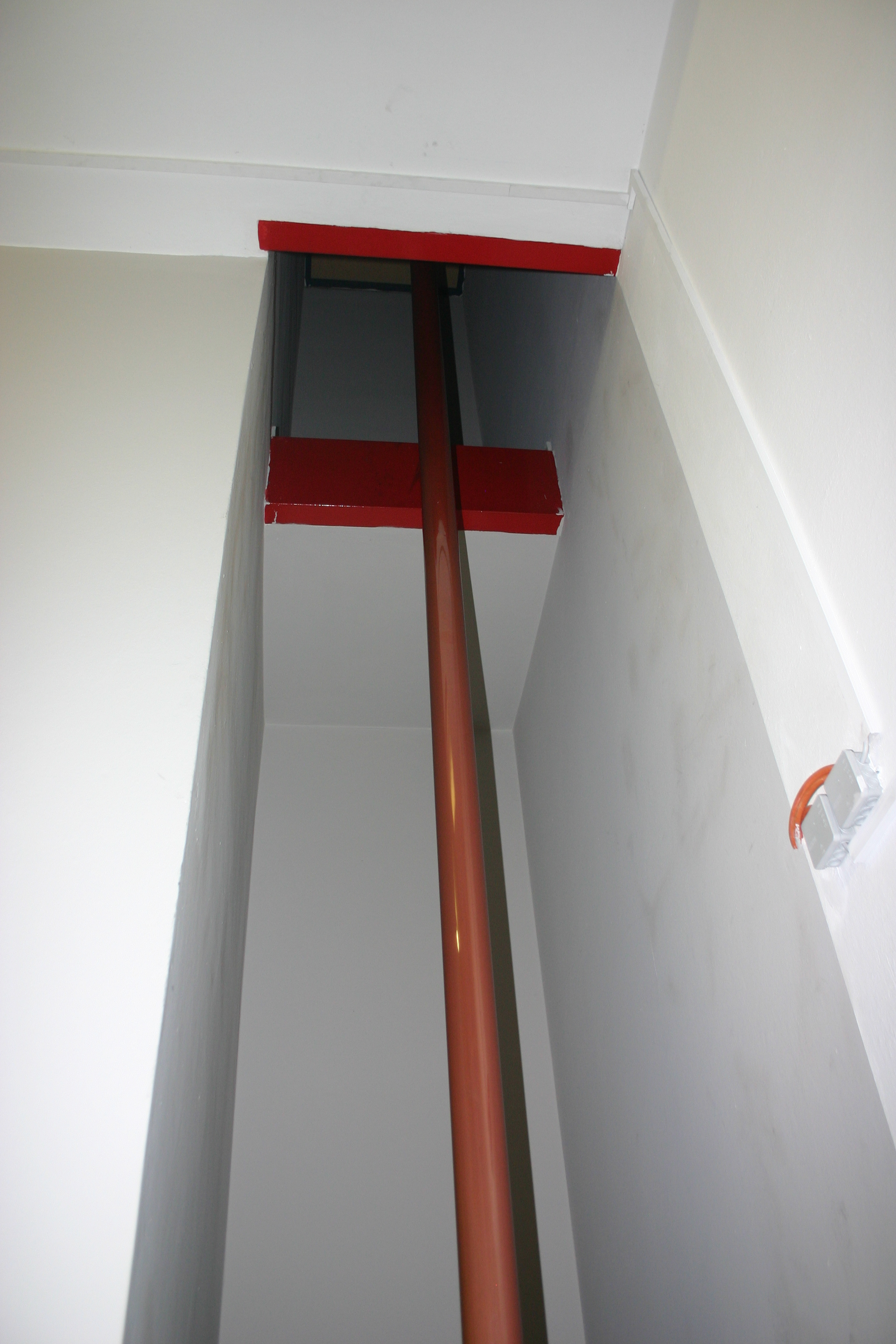 Rutschstange in der Zentralwache der Berufsfeuerwehr Graz, Lendplatz, Betongebäude erbaut 1970 bis 1983, spätestens 1991.